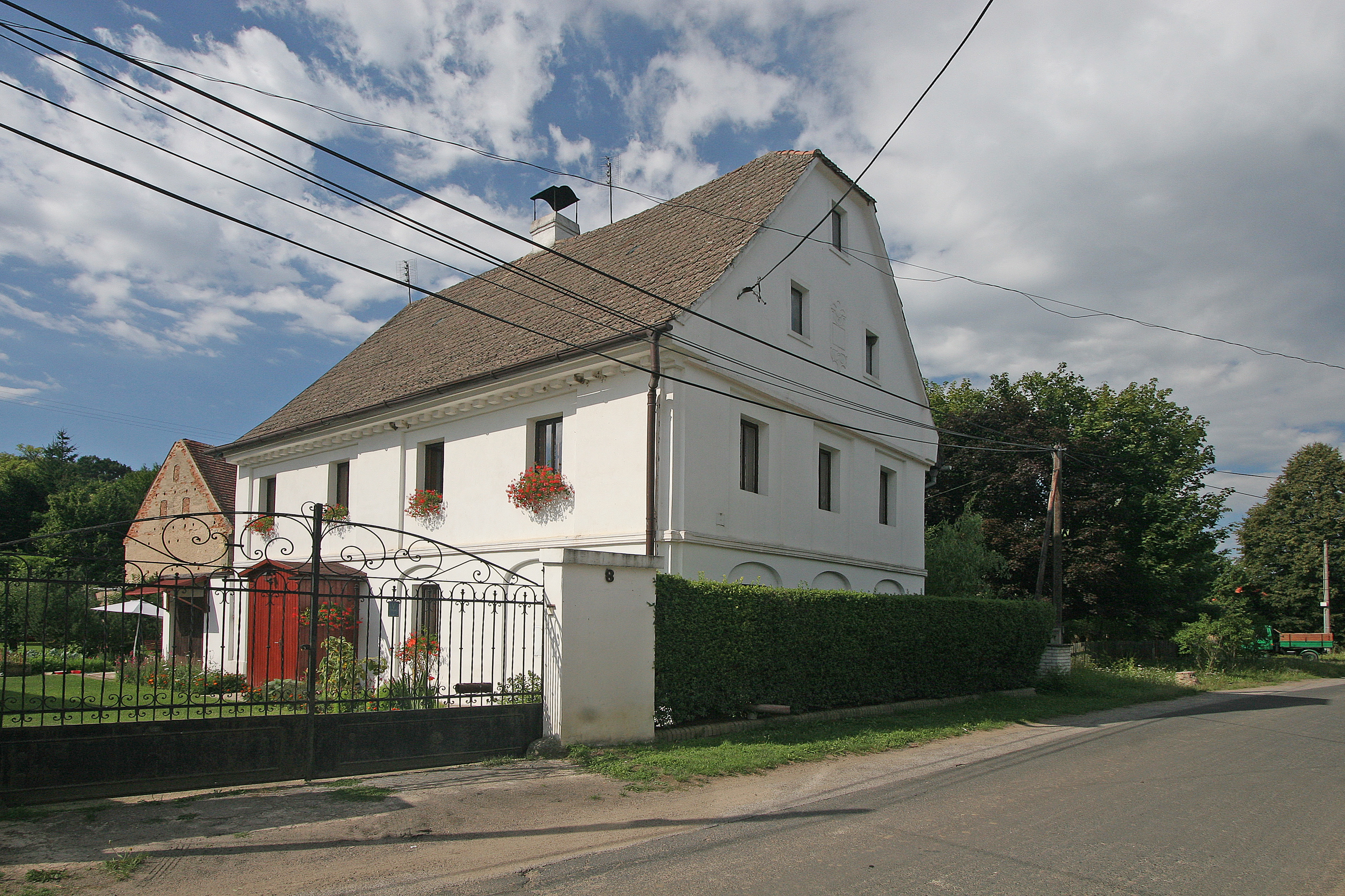 Venkovský dům (Tetčiněves), Tetčiněves 8